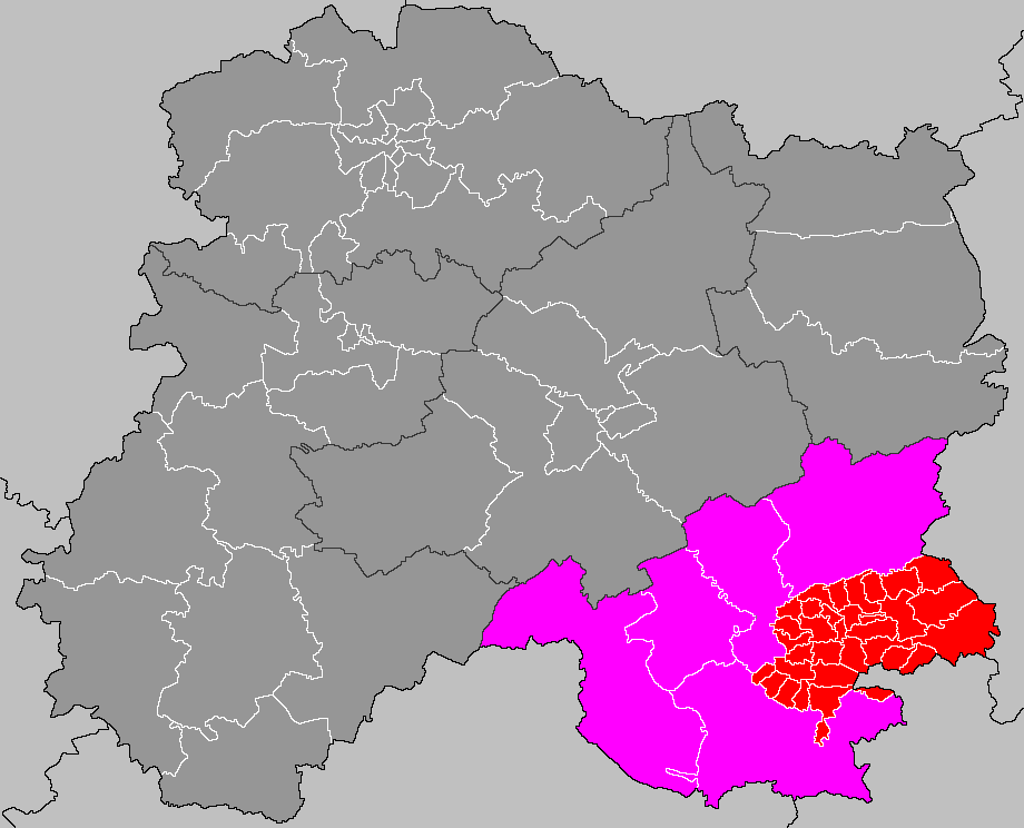 Localisation du canton de Thiéblemont-Farémont